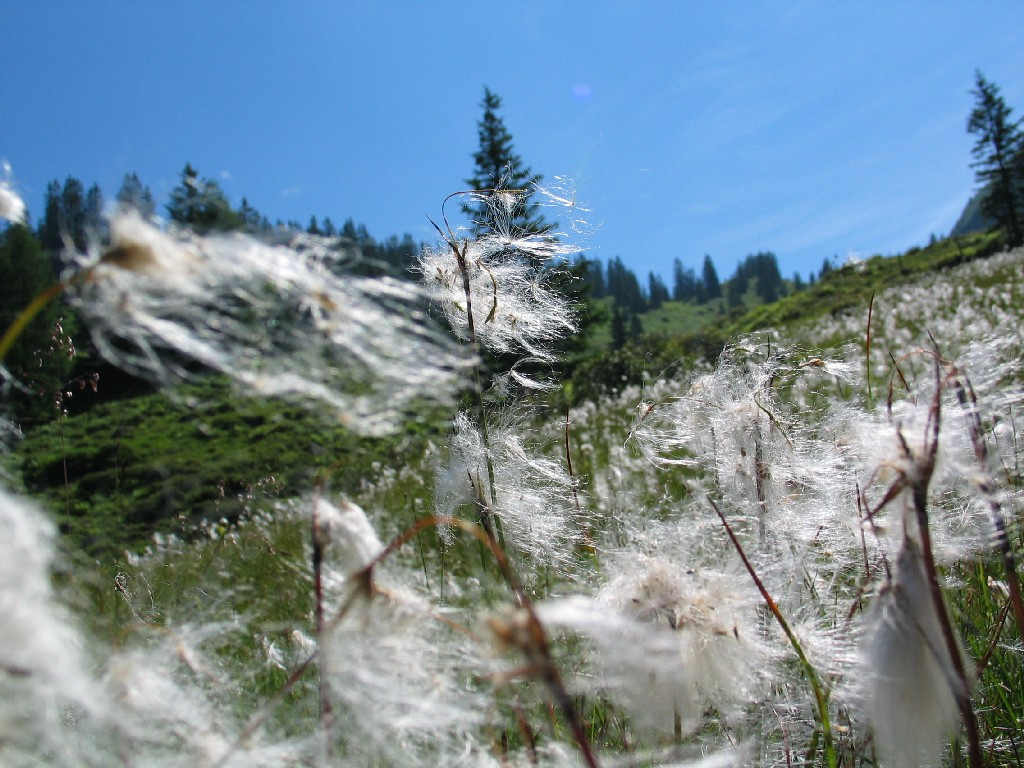 Schmalblättriges Wollgras (Eriophorum angustifolium) bei Fieberbrunn, Tirol